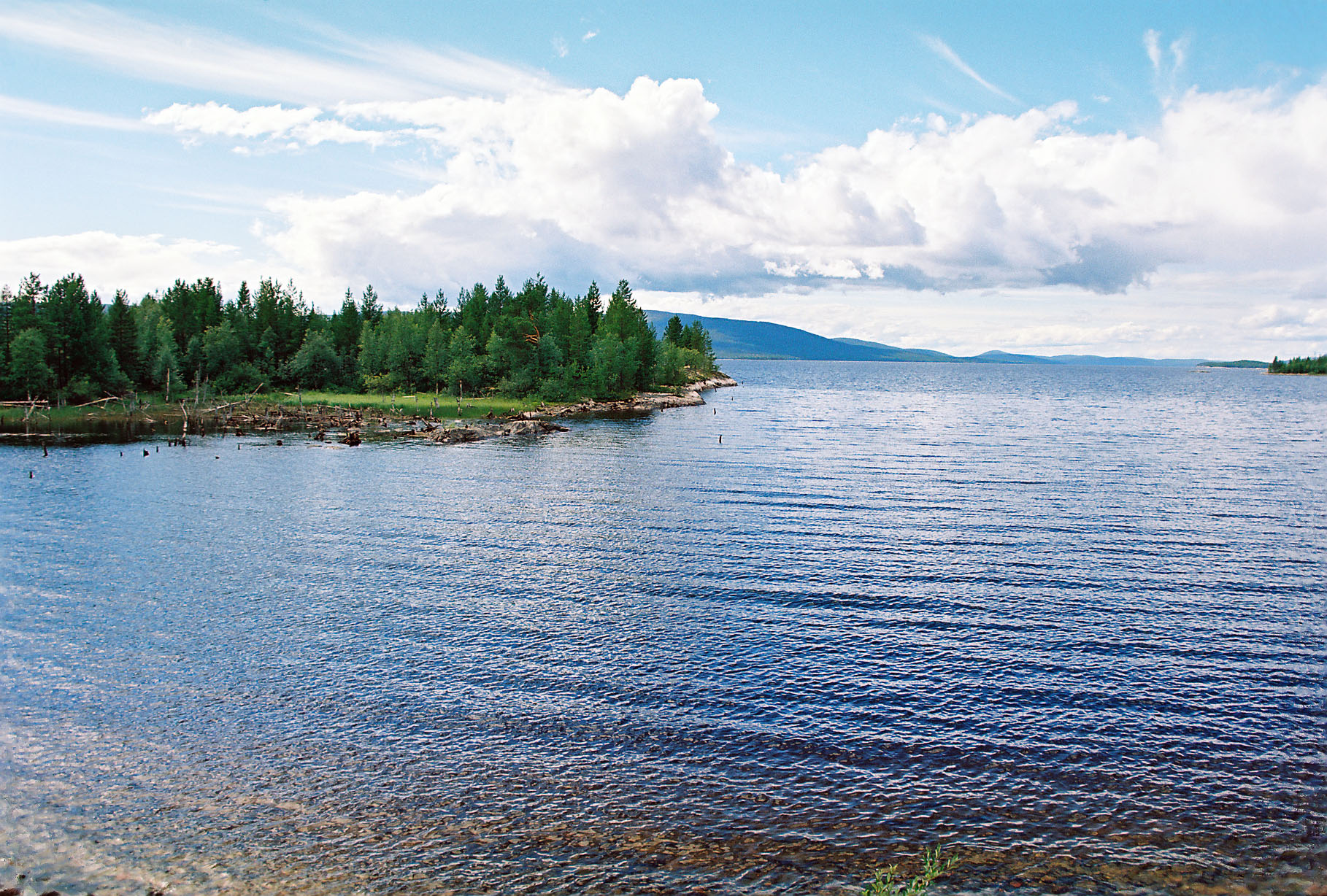 озеро Толванд, вид с дороги